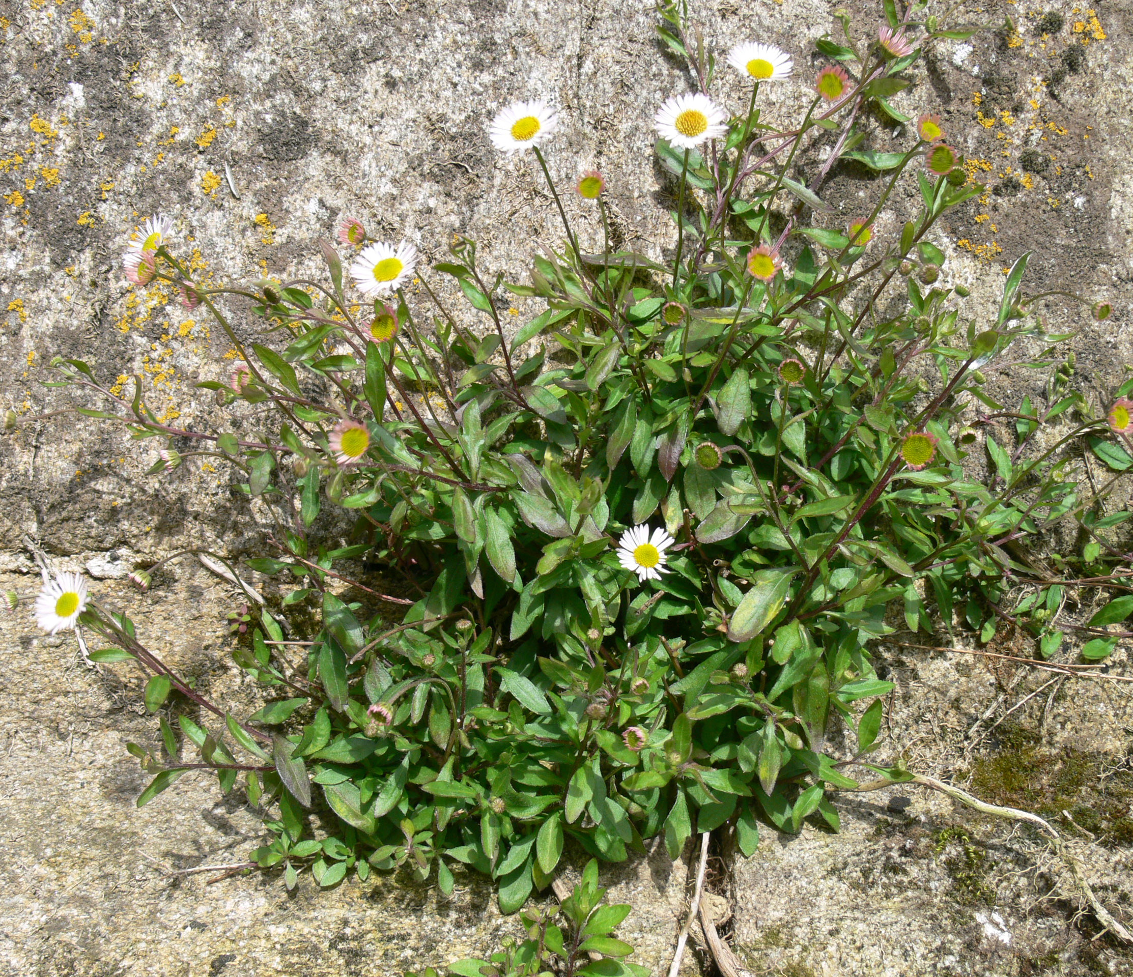 forme muricole de pâquerette poussant sur les murs de l'église de Le Guéro (murs de granit) en Bretagne sud (Morbihan).